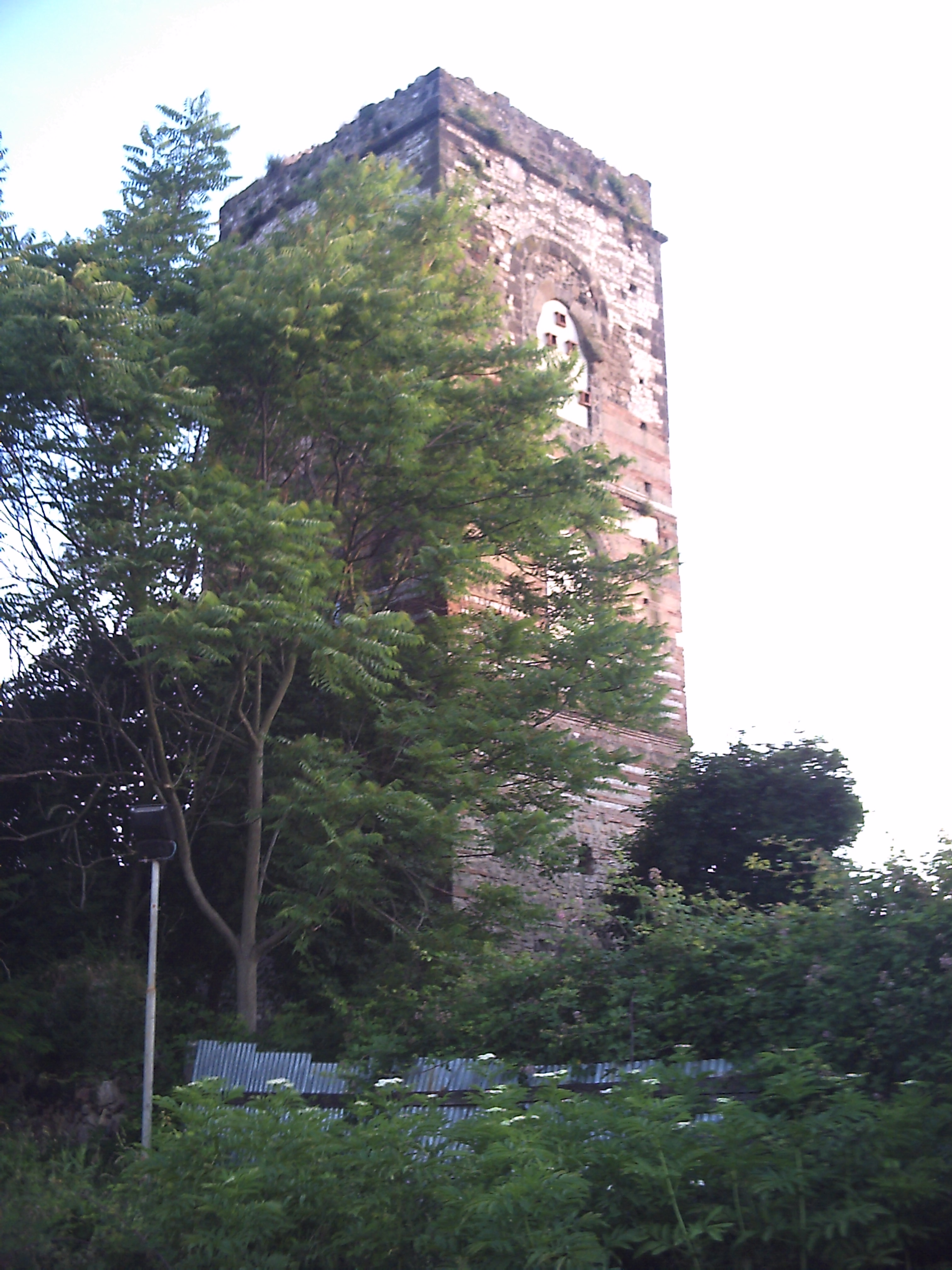 Particolare della torre campanaria presso i ruderi della Cattedrale di Telese (Bn)